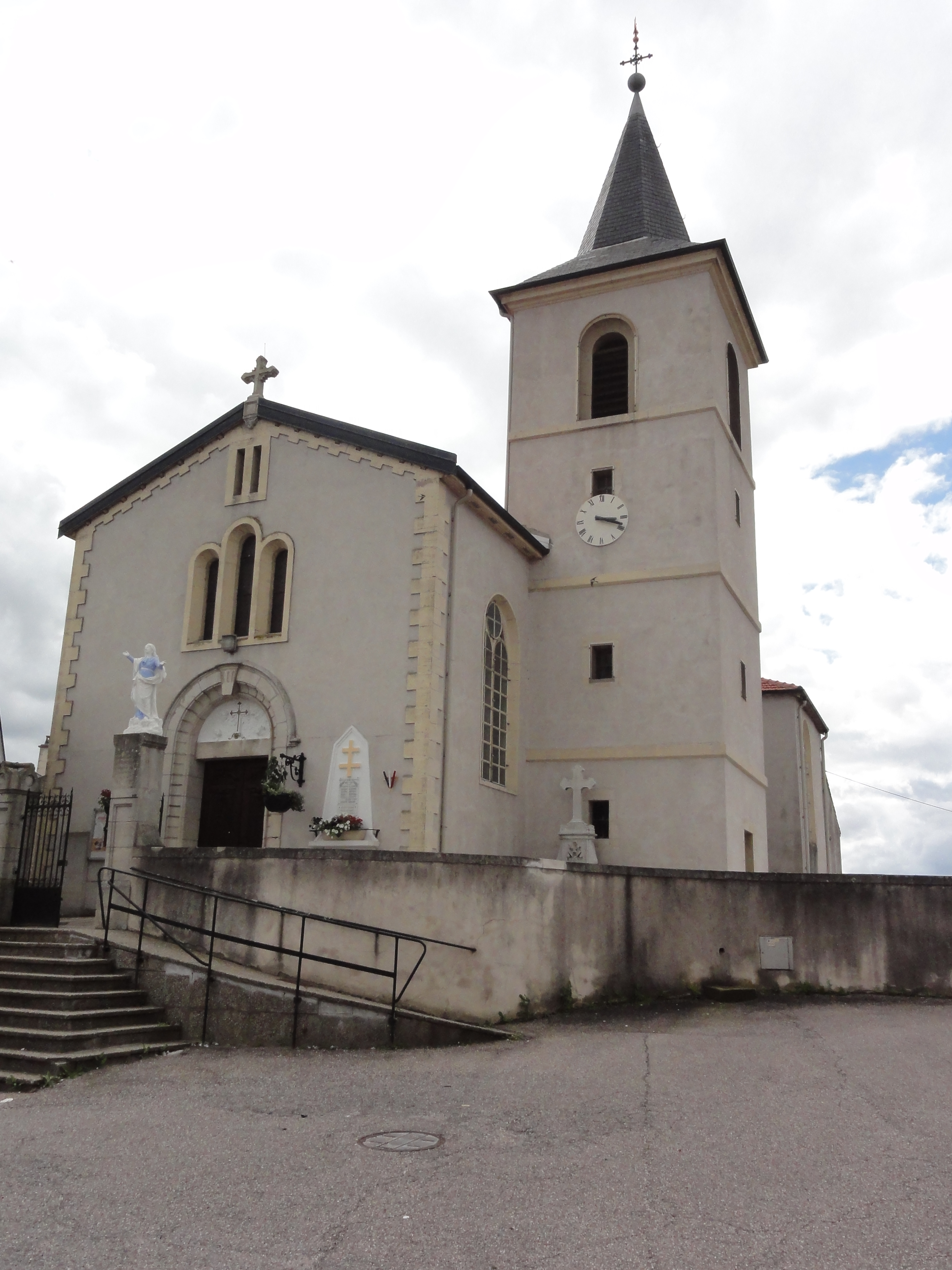 Richardménil (M-et-M) église